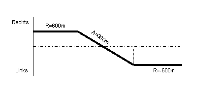 de=Krümmungsband einer Wendeklotoide